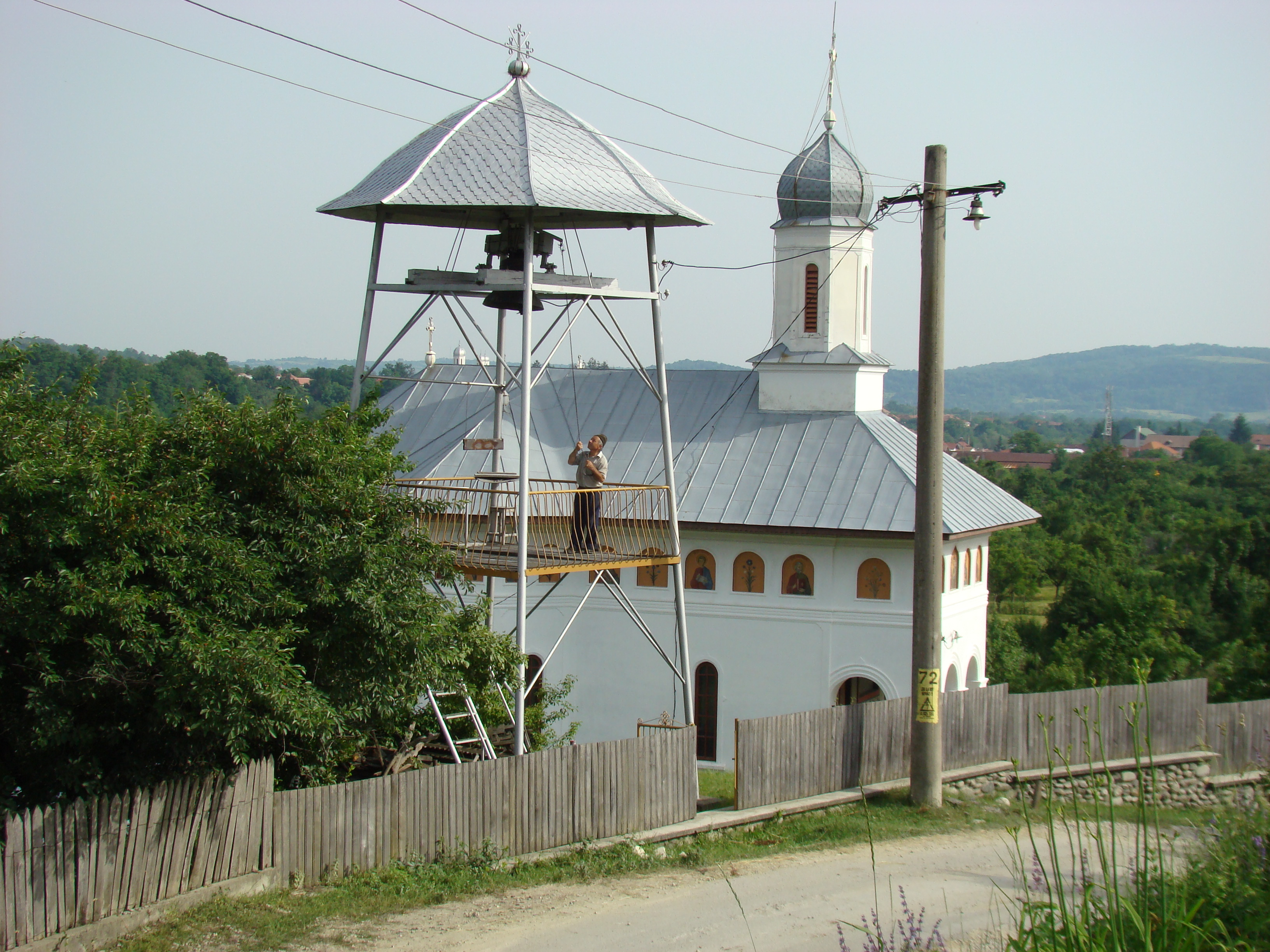 Biserica nouă din Novaci-Români, județul Gorj